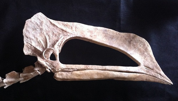 Skull & feet :)